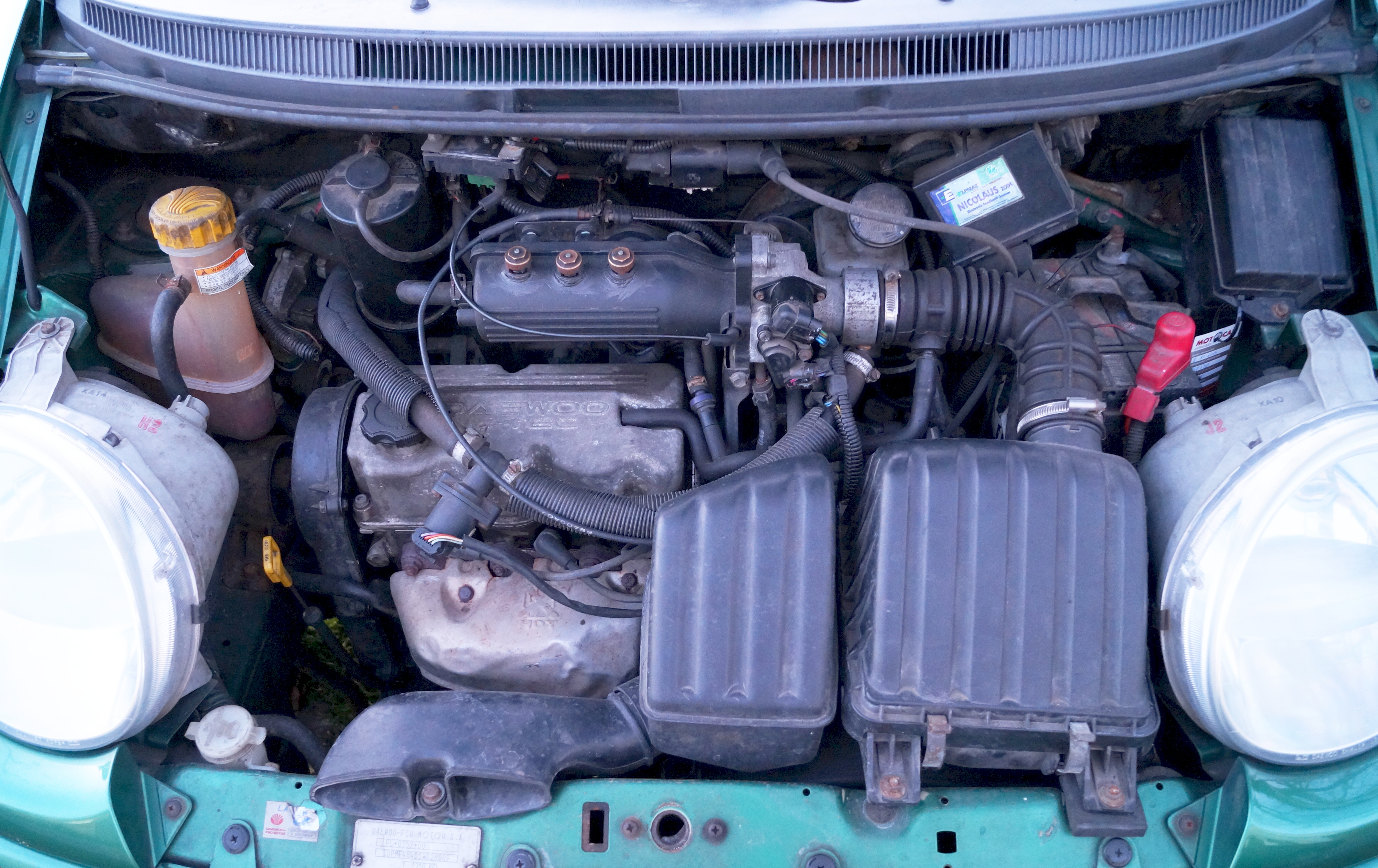 Silnik M-Tec 0,8 l z osprzętem LPG zainstalowany w aucie Daewoo Matiz